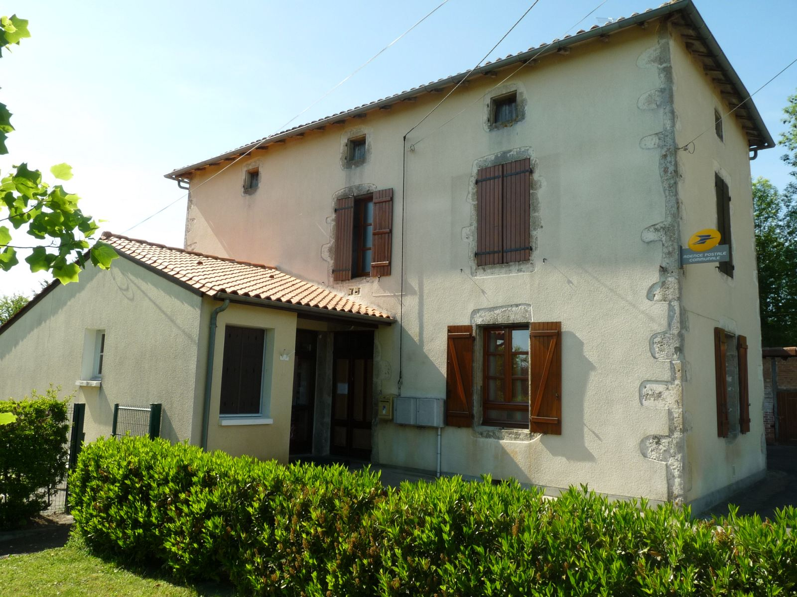 mairie de St-Quentin-sur-Charente, France